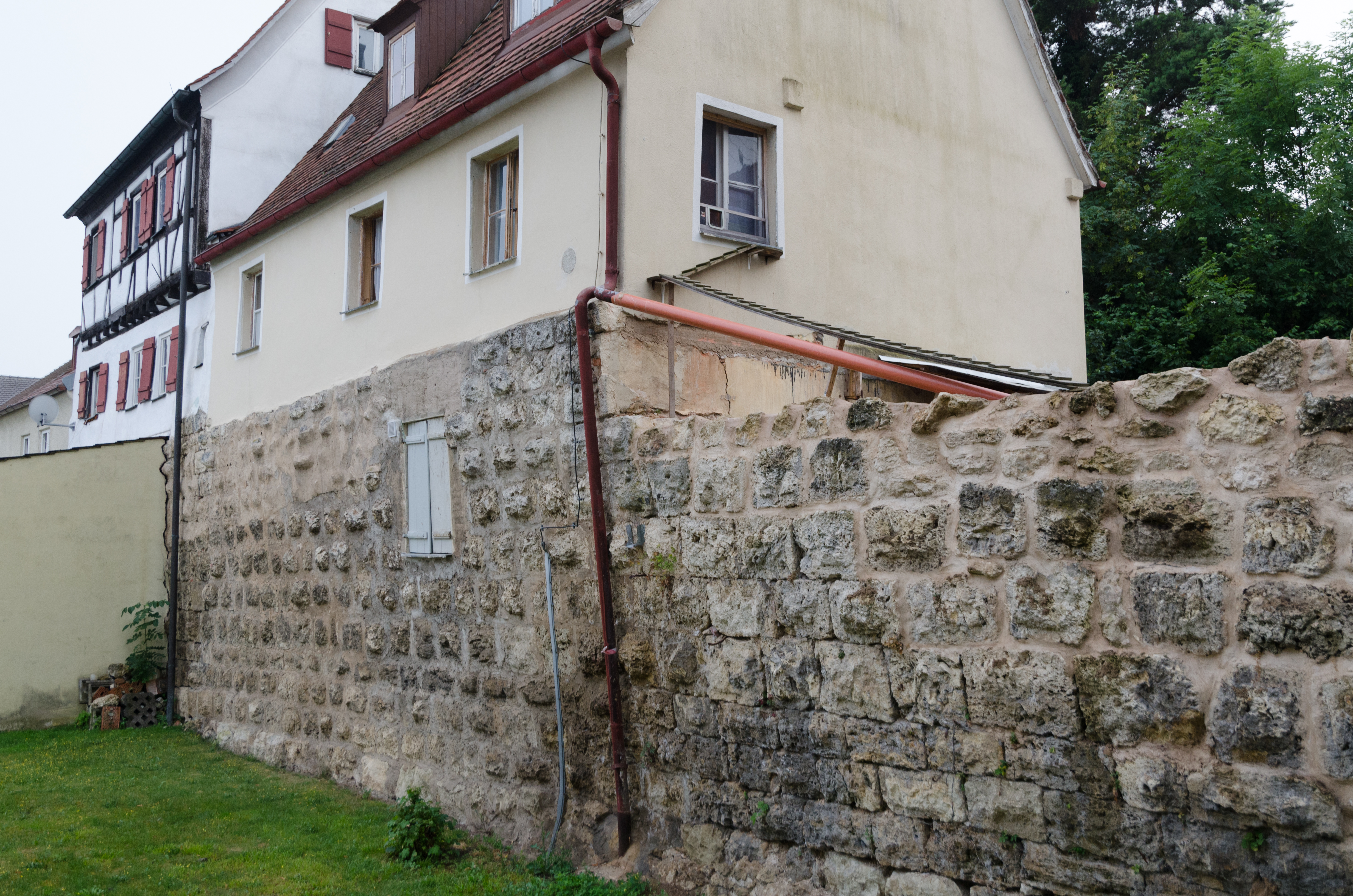 Oettingen in Bayern, Ledergasse 24, 26, Stadtmauer